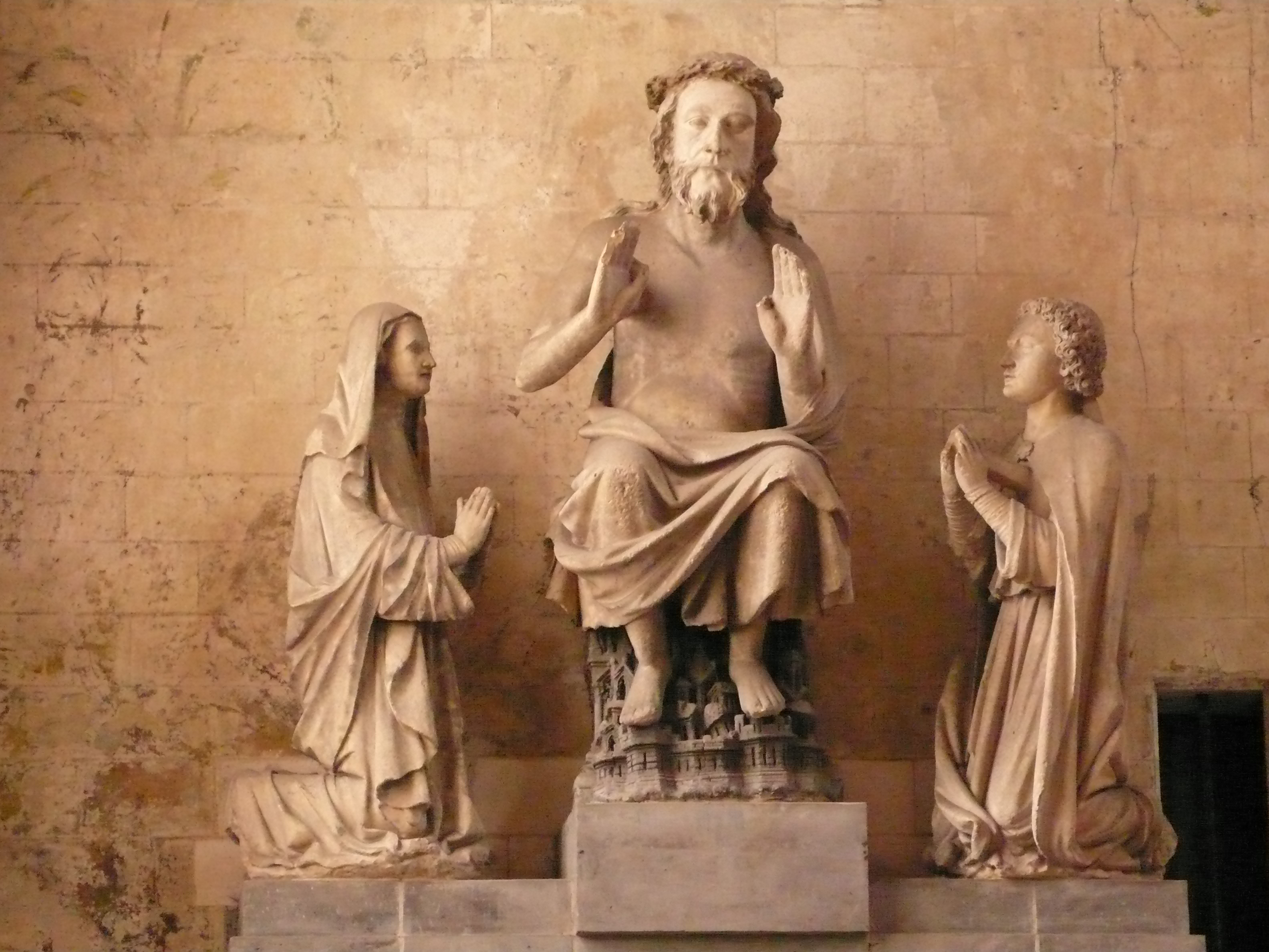 Cathédrale Notre-Dame de Saint-Omer, Frankreich; Thronender Christus von Thérouanne